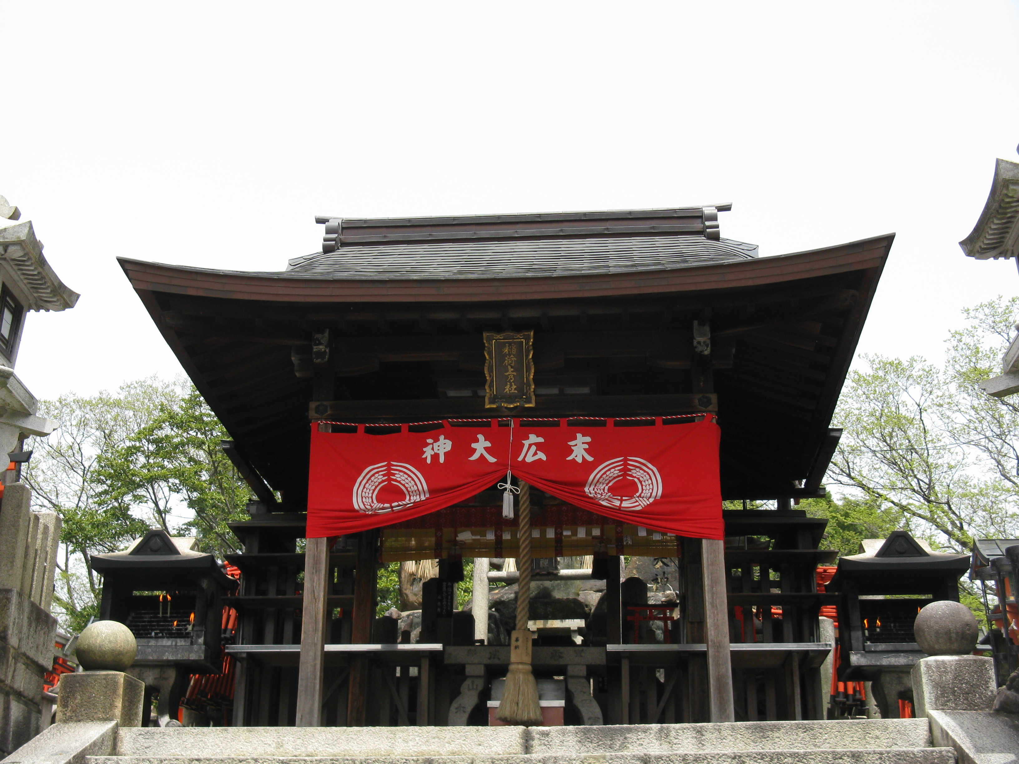 伏見稲荷大社 上ノ社